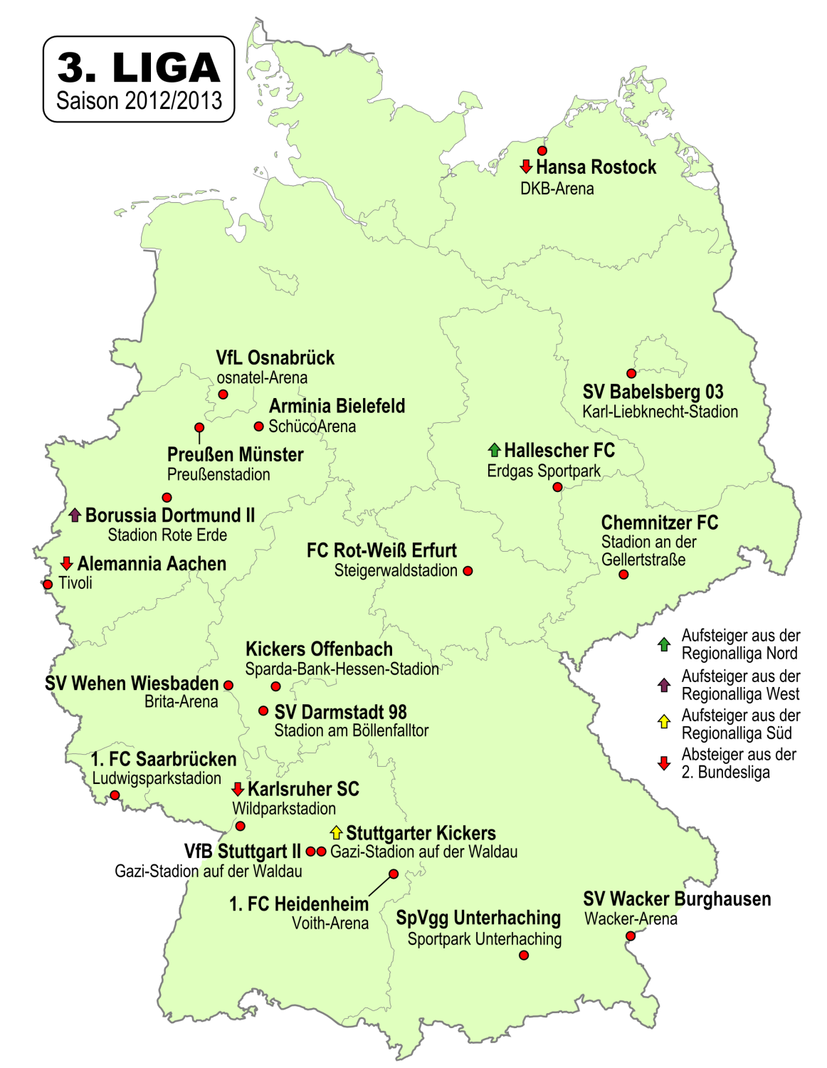 Karte der Vereine der 3. Fussball-Liga 2012/2013